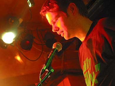 Markus Freise, live beim Poetry Slam Bielefeld